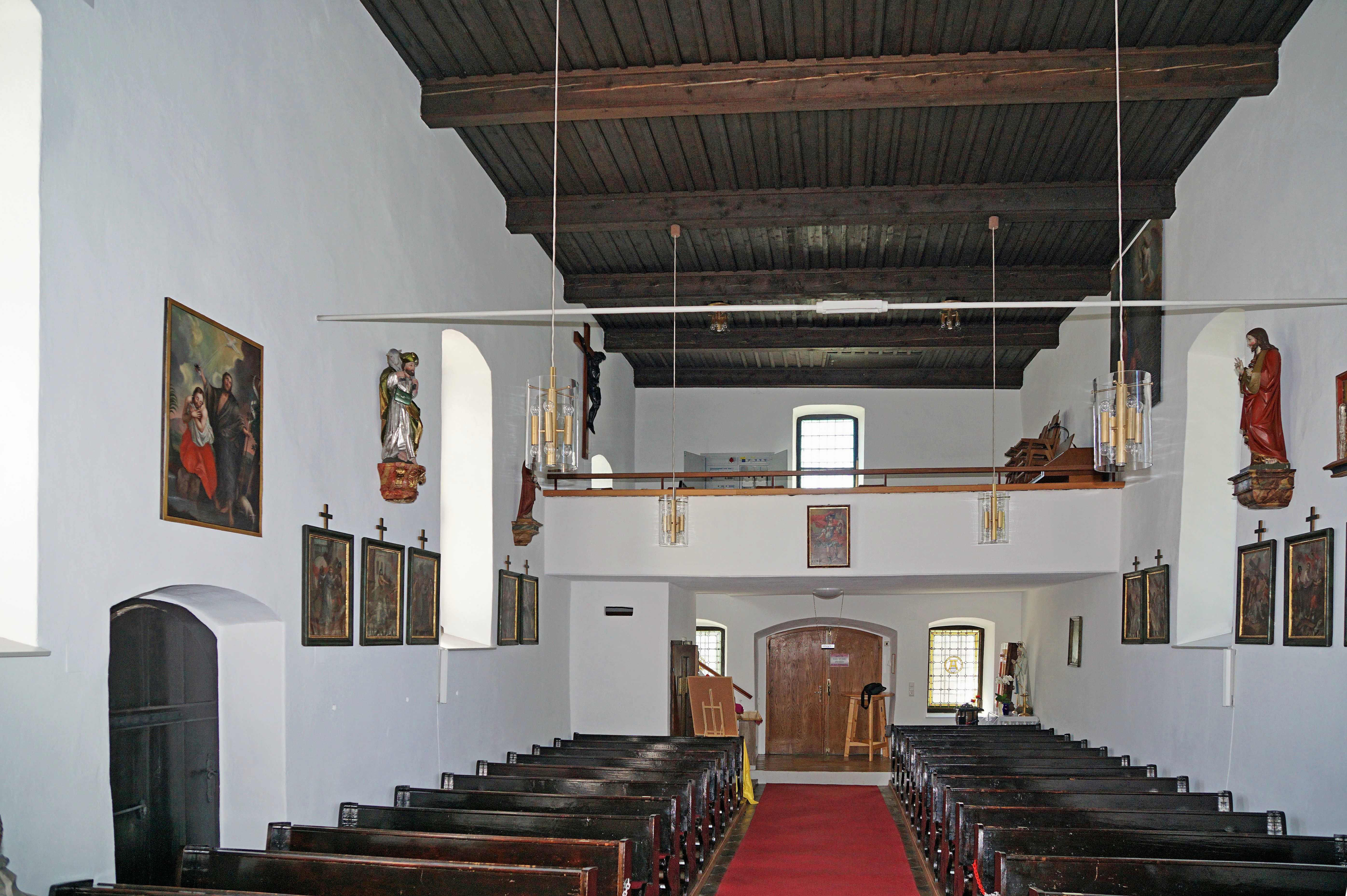 Kath. Pfarrkirche Fürnitz, Innenansicht zur Westempore